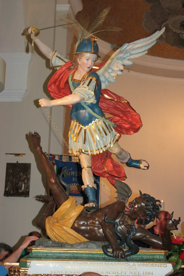 San Michele